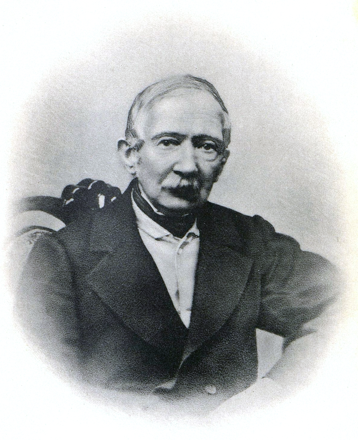 Оболенский, Евгений Петрович